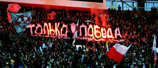 Баннер "Только победа" в кубковом матче против "Динамо". 2009 год